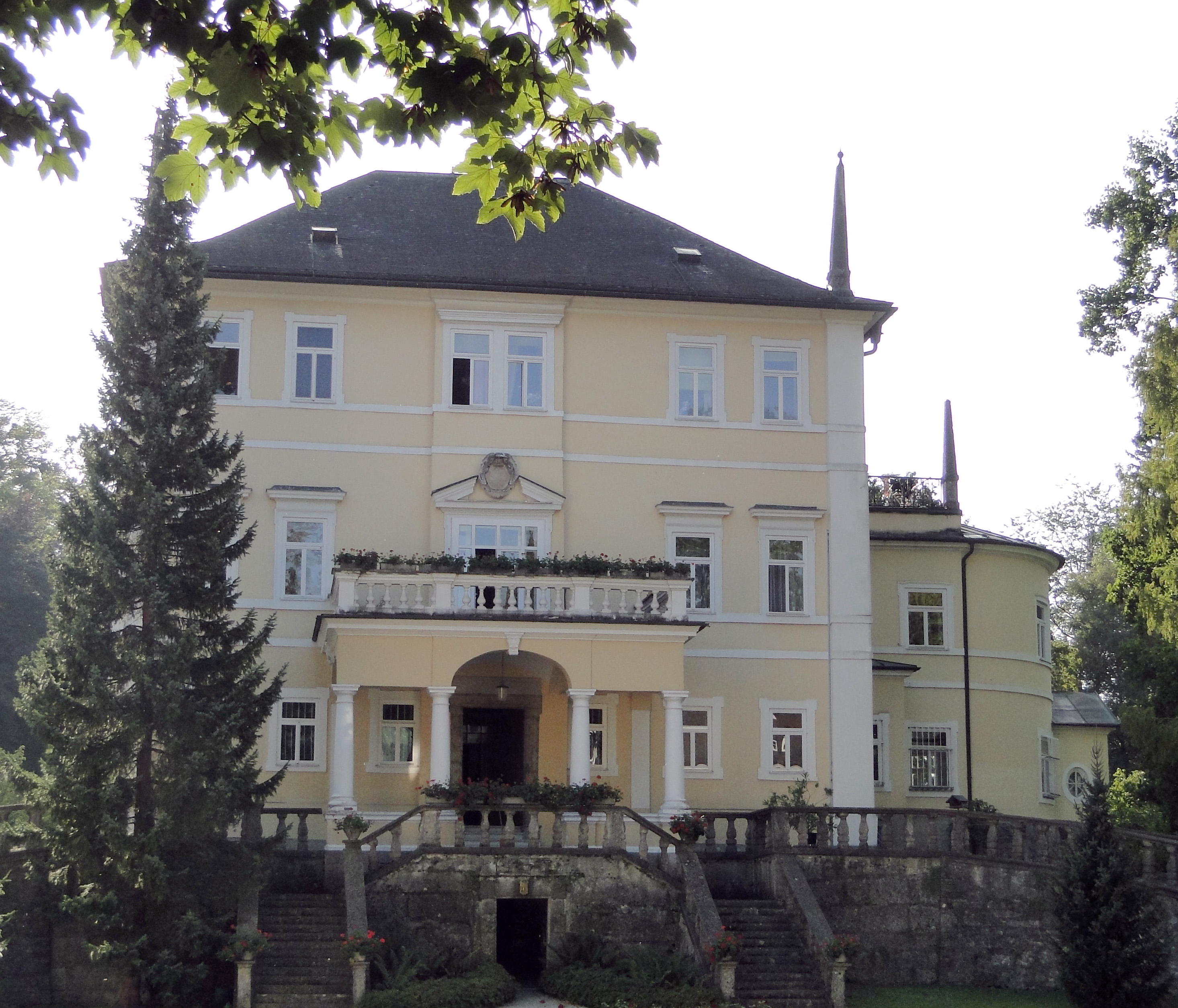 Schloss Emsburg (Kreuzhofschloss) mit Inventar